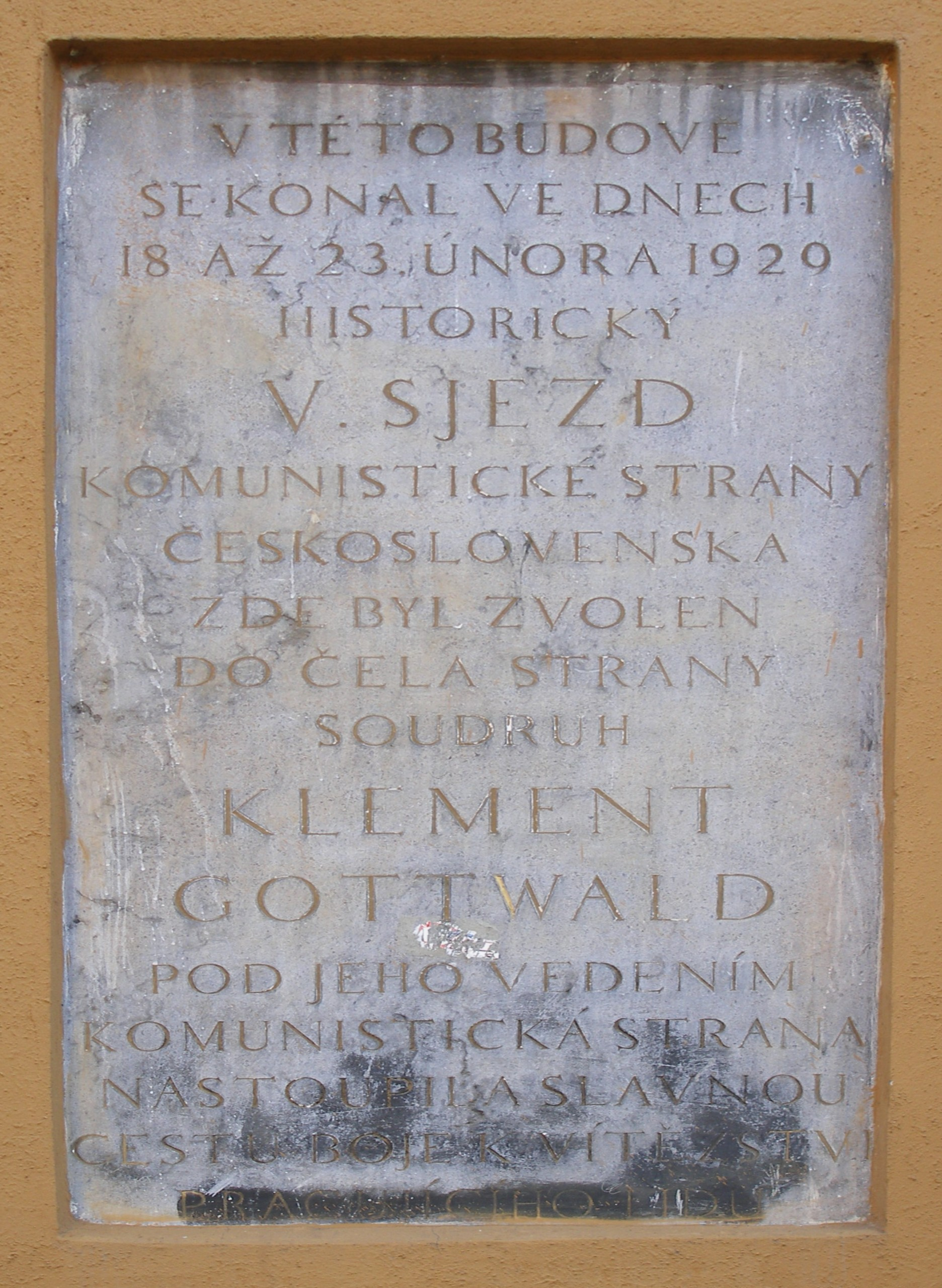 Detail pamětní desky na budově Domoviny. Na desce je text „V této budově se konal ve dnech 18. až 23. února 1929 historický V. sjezd Komunistické strany Československa. Zde byl zvolen do čela strany soudruh Klement Gottwald. Pod jeho vedením komunistická strana nastoupila slavnou cestu boje k vítězství pracujícího lidu.“